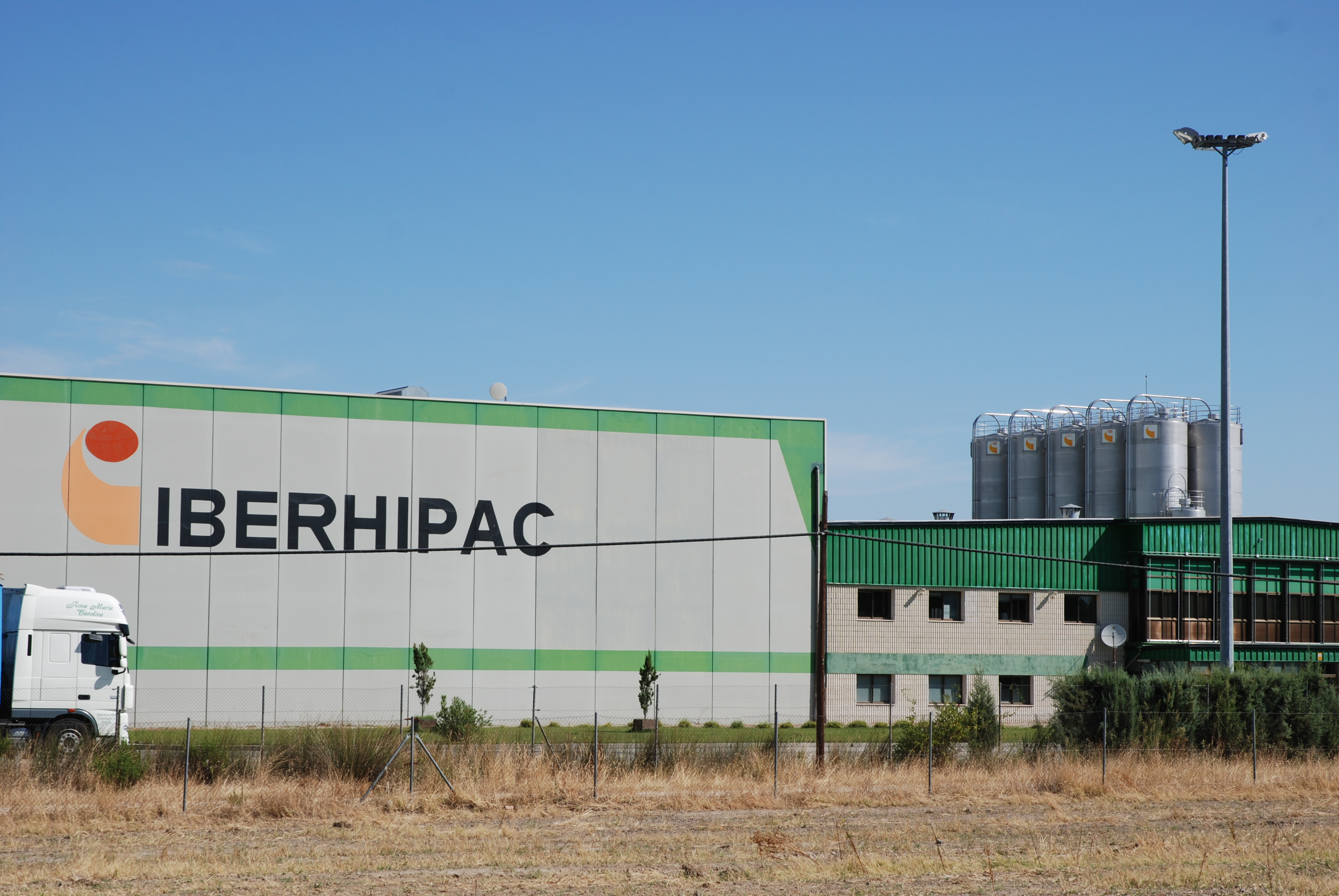 Fábrica de plásticos IBERHIPAC en Saucedilla (Cáceres)